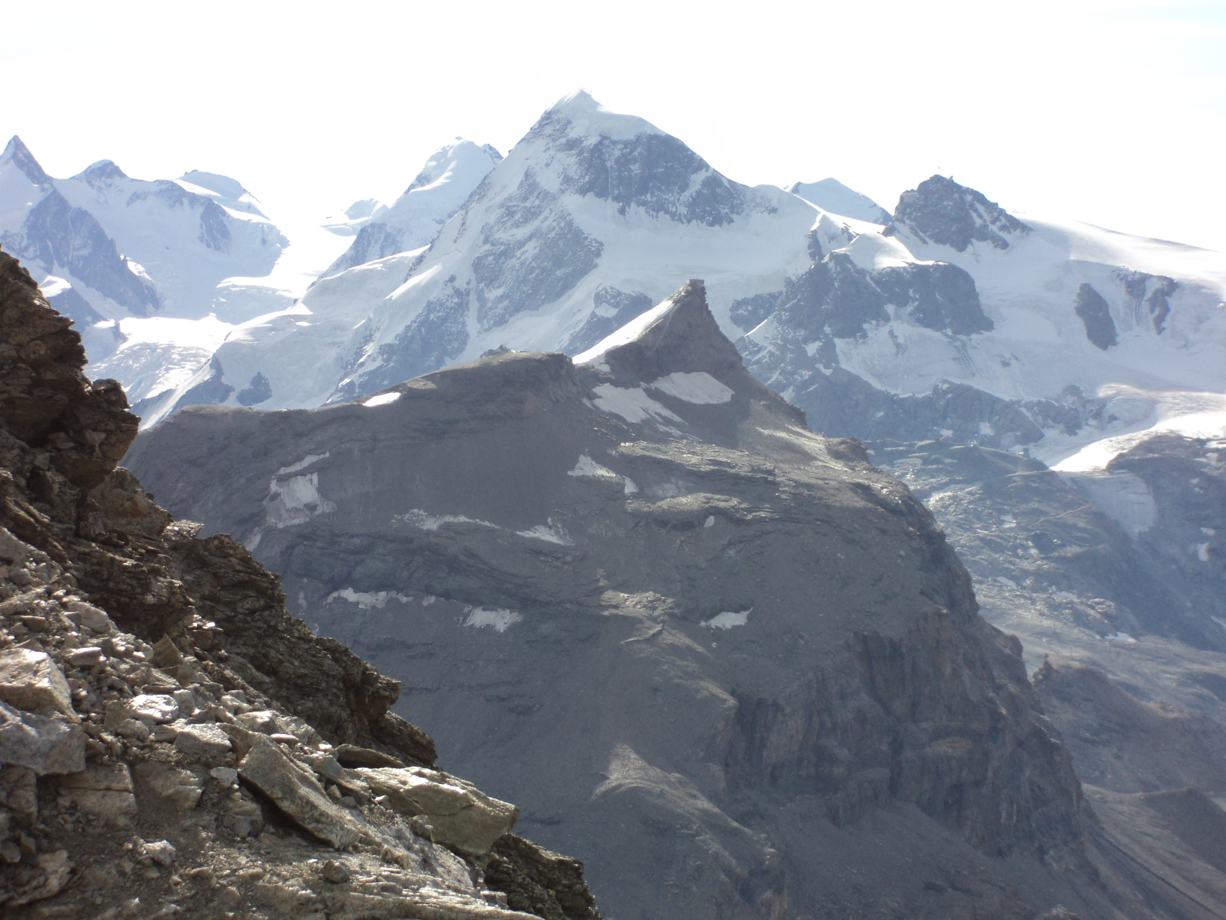 Il Furgenn visto da ovest. Sullo sfondo il Monte Breithorn ed altre montagne del monte Rosa